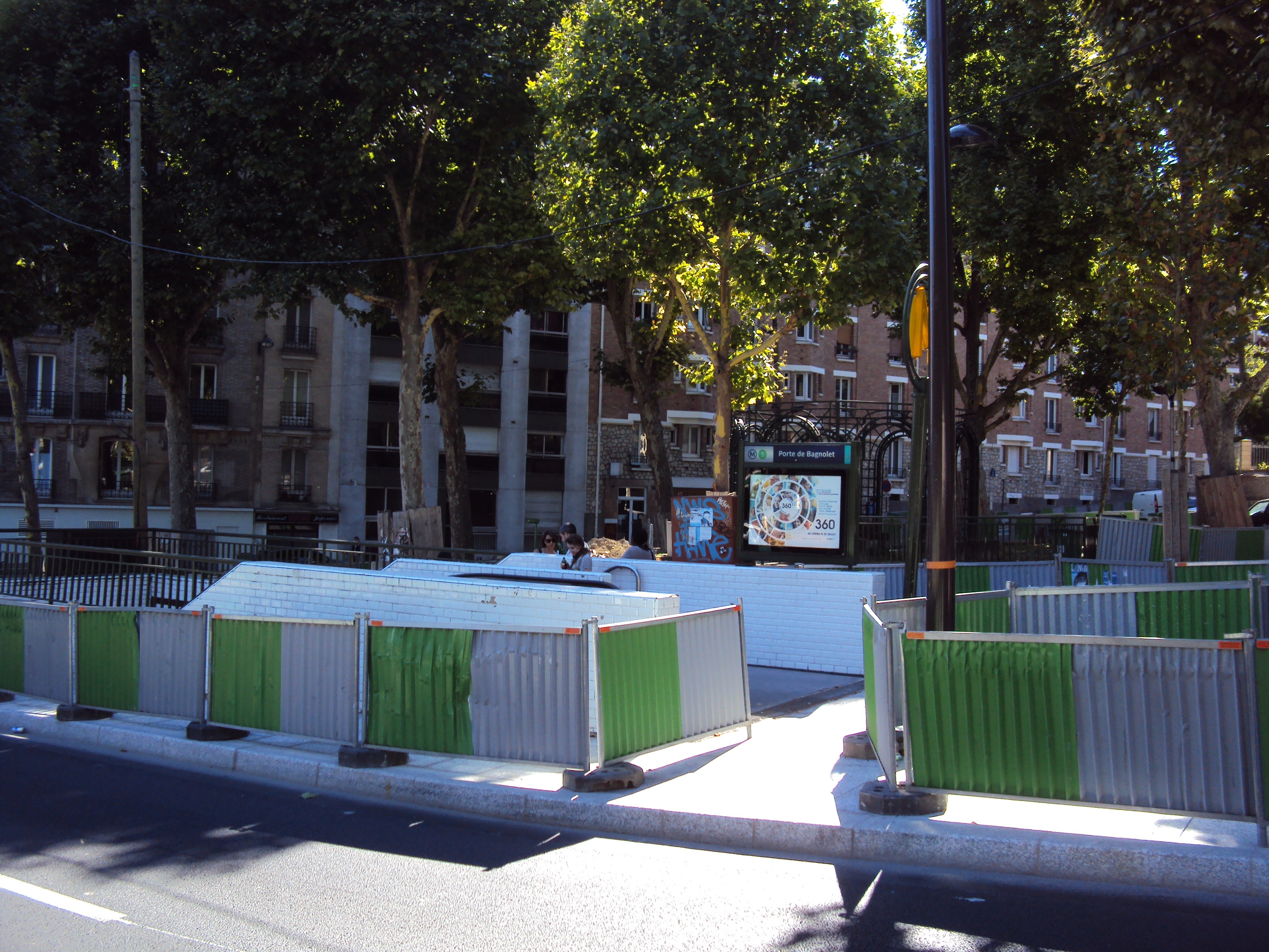 Travaux du tramway T3 Acces renoves station porte de Bagnolet